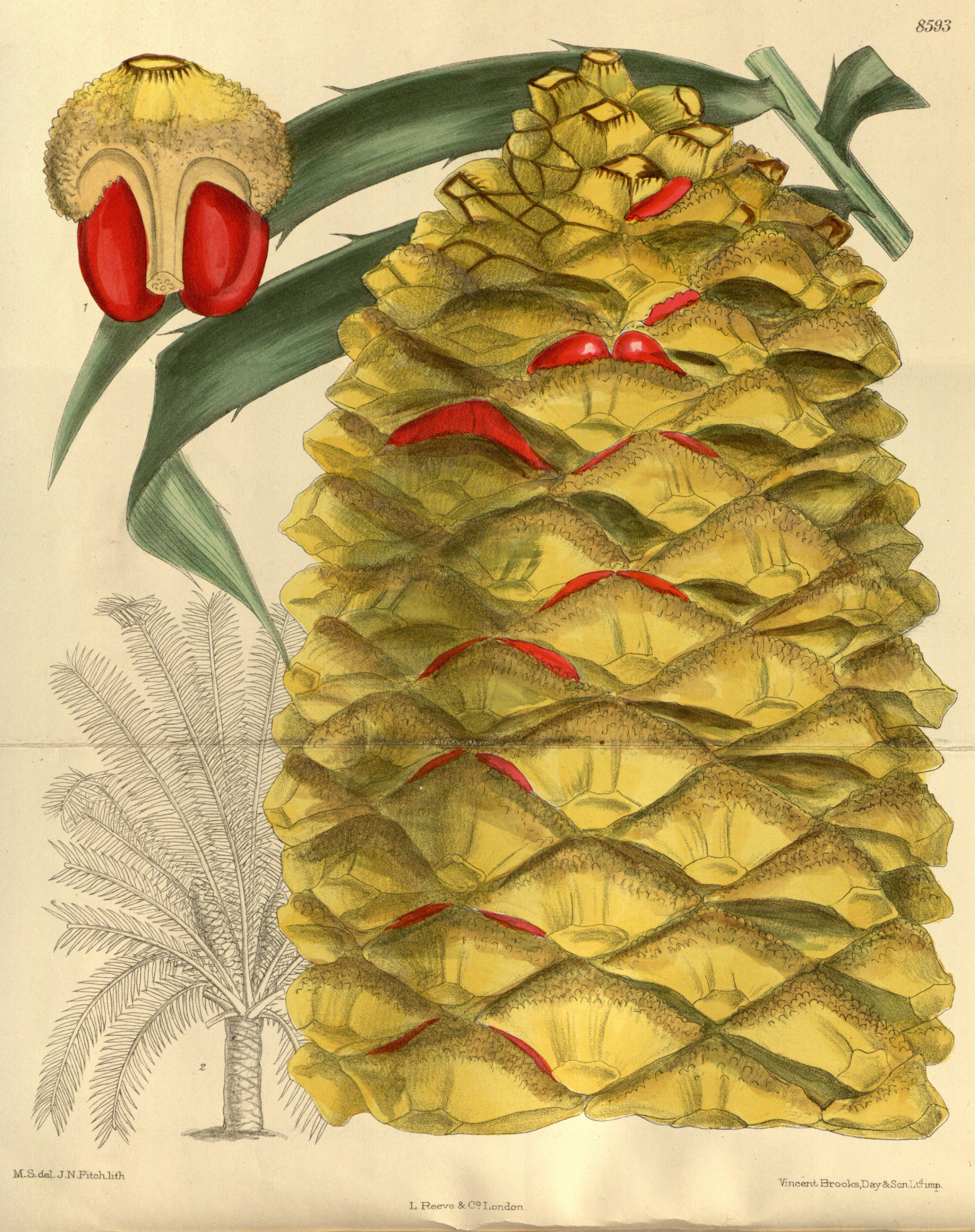 Encephalartos_hildebrandtii, female plant, Zamiaceae